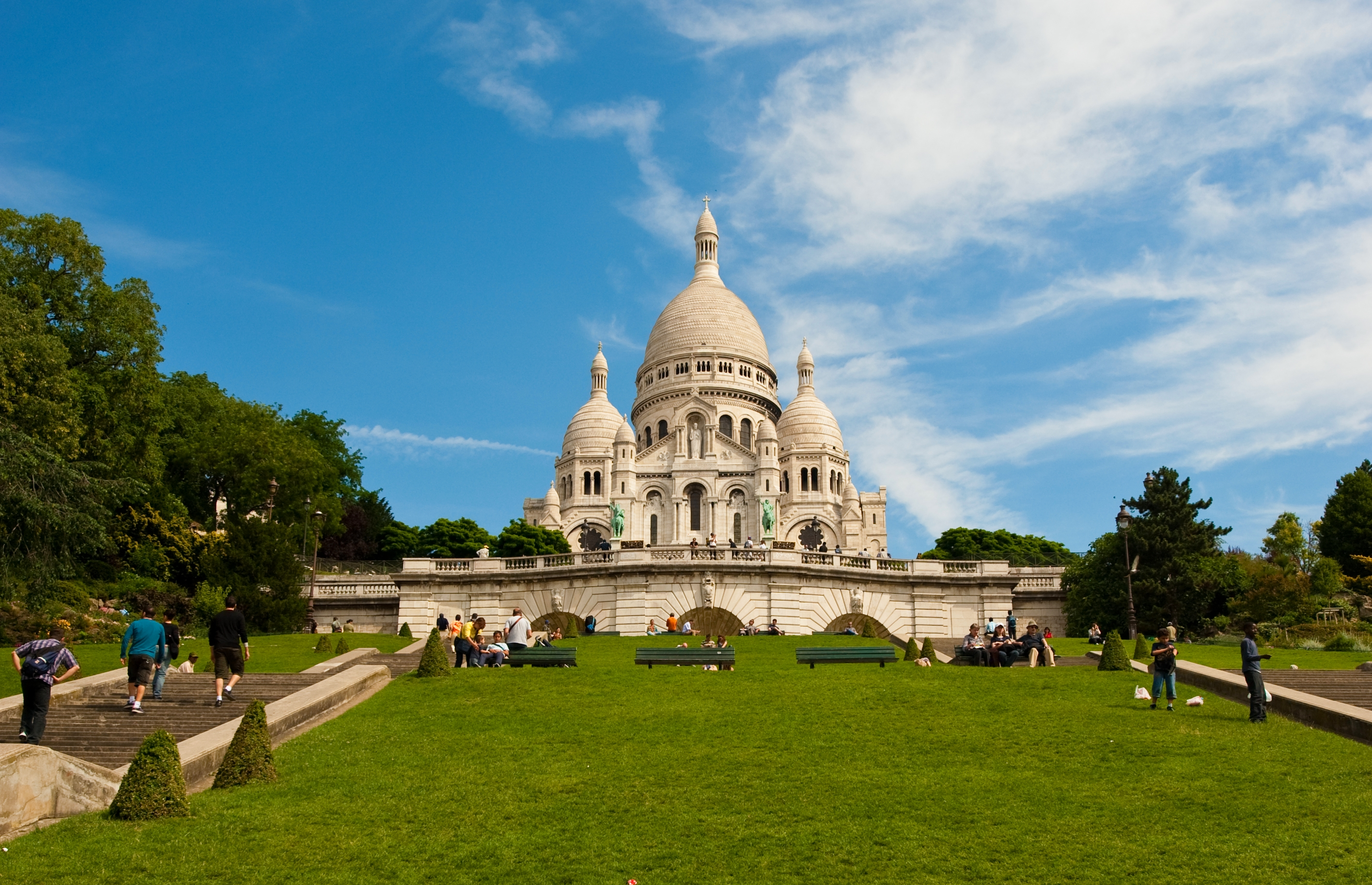 Basilique du Sacré-Cœur de Montmartre